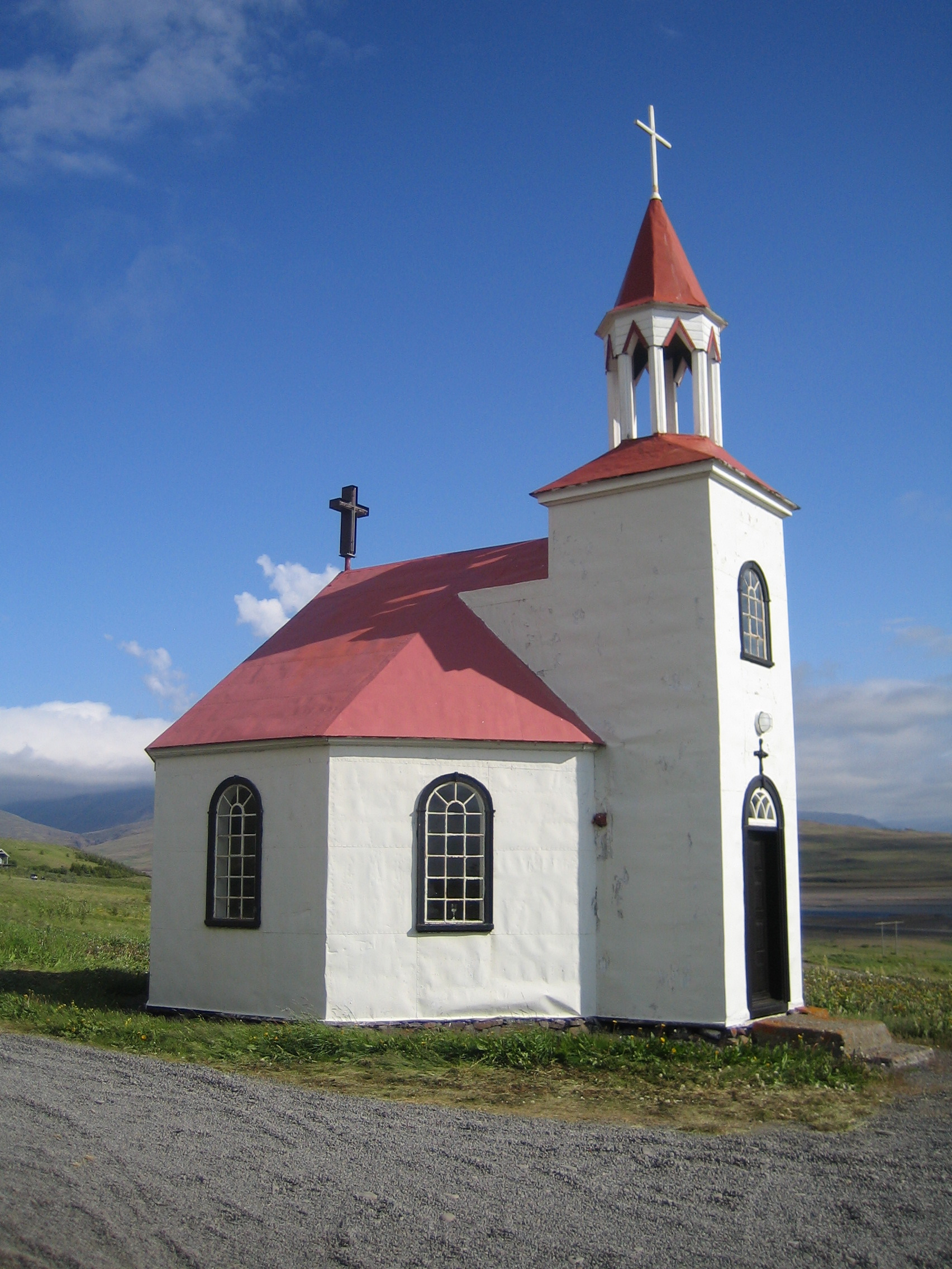 Kirkjan á Silfrastöðum